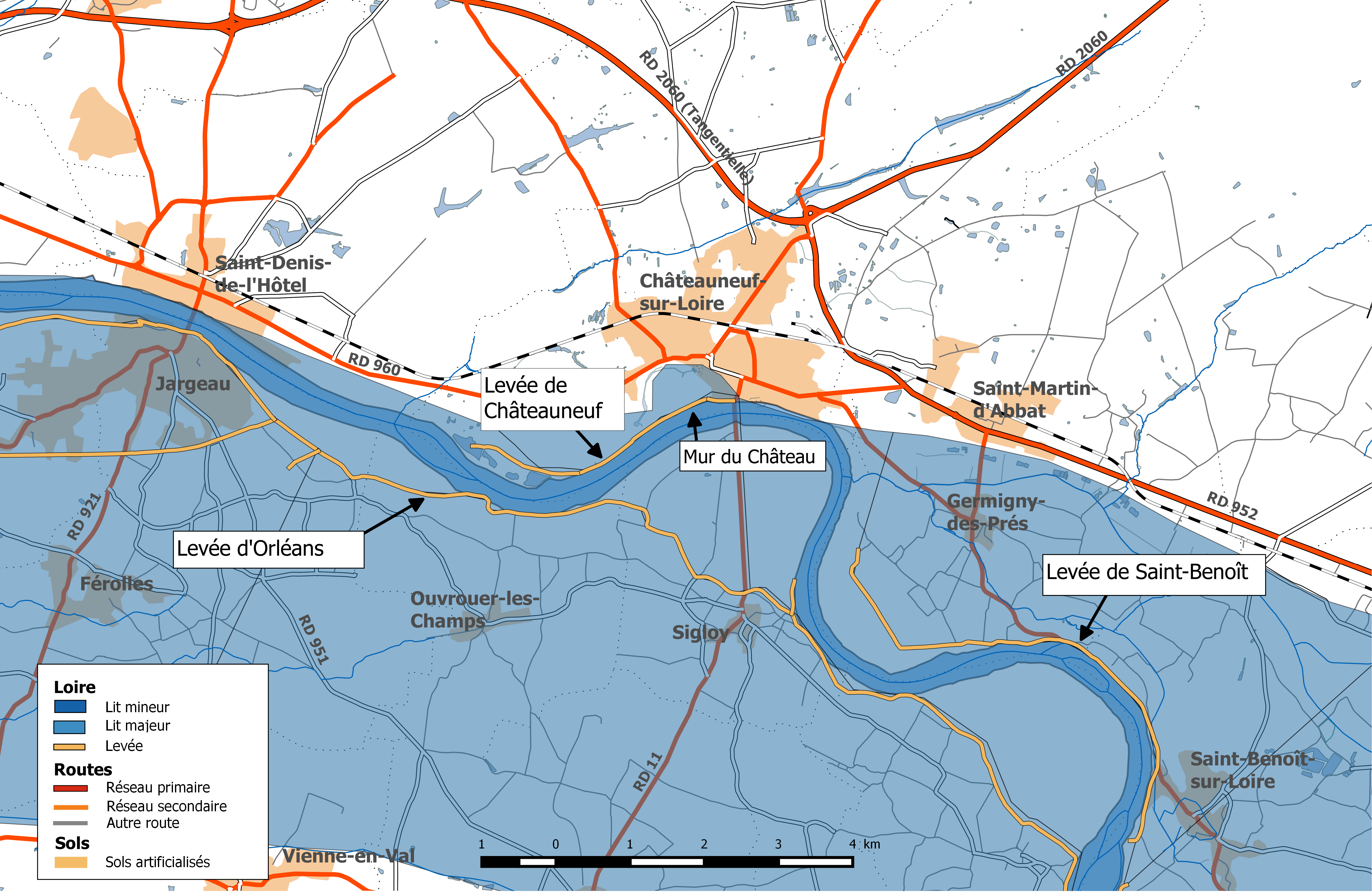 Système d'endiguement de la Loire dans le département du Loiret. Val de Châteauneuf.